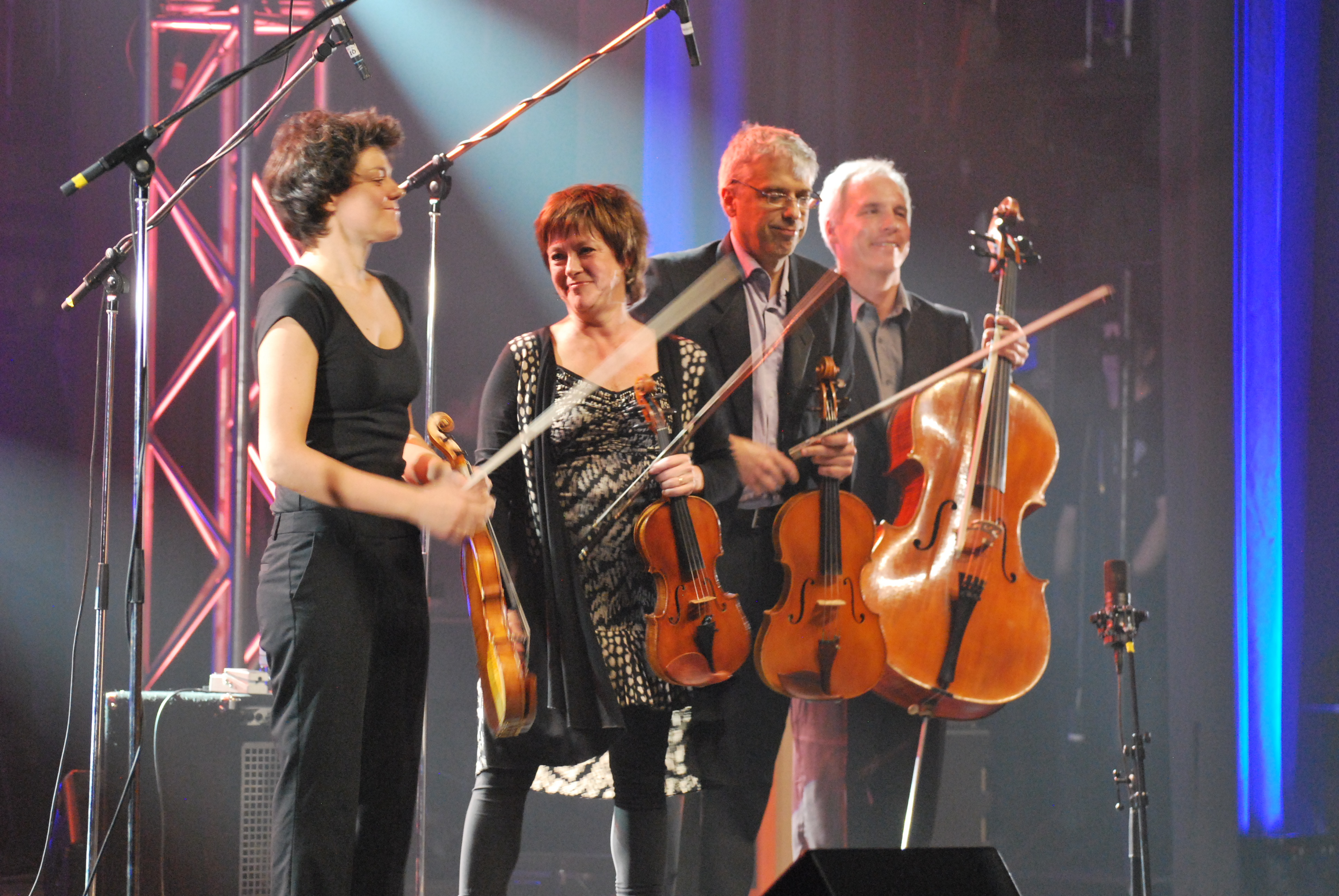 Spectacle de soutien à la Société Radio-Canada tenu à la salle François Brassard du Cégep de Jonquière le 8 octobre 2014.